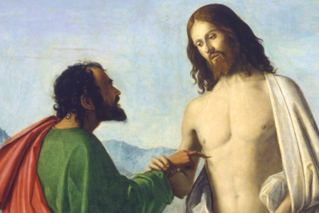 Cima da conegliano, incredulità di san tommaso col vescovo magno, dettaglio